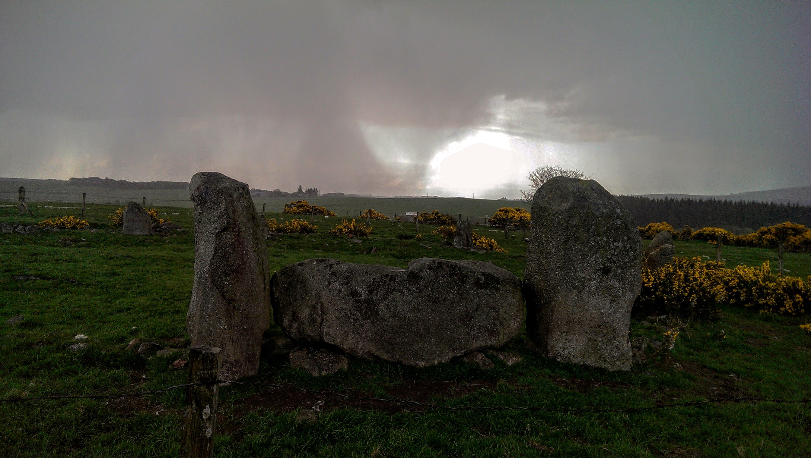 Recumbent Stone Circle nr Strichen